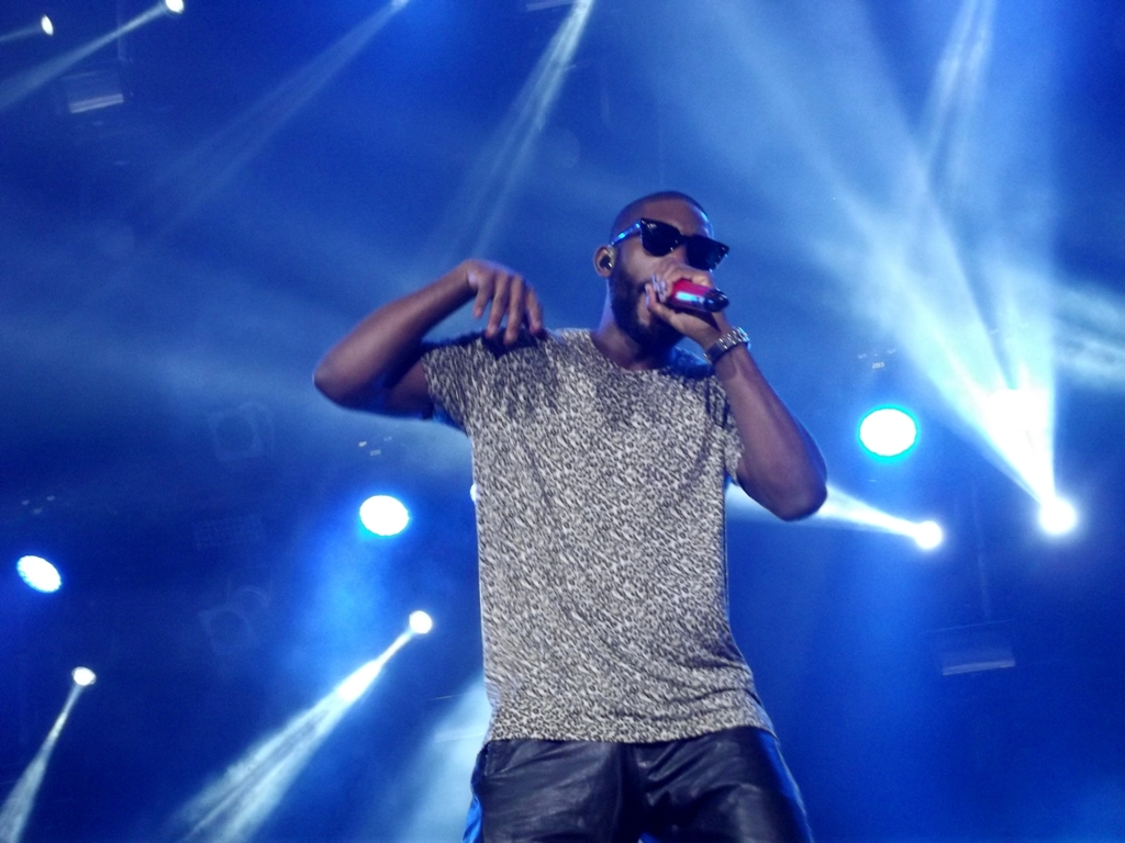 Tinie Tempah performing during Orange Warsaw Festival 2013